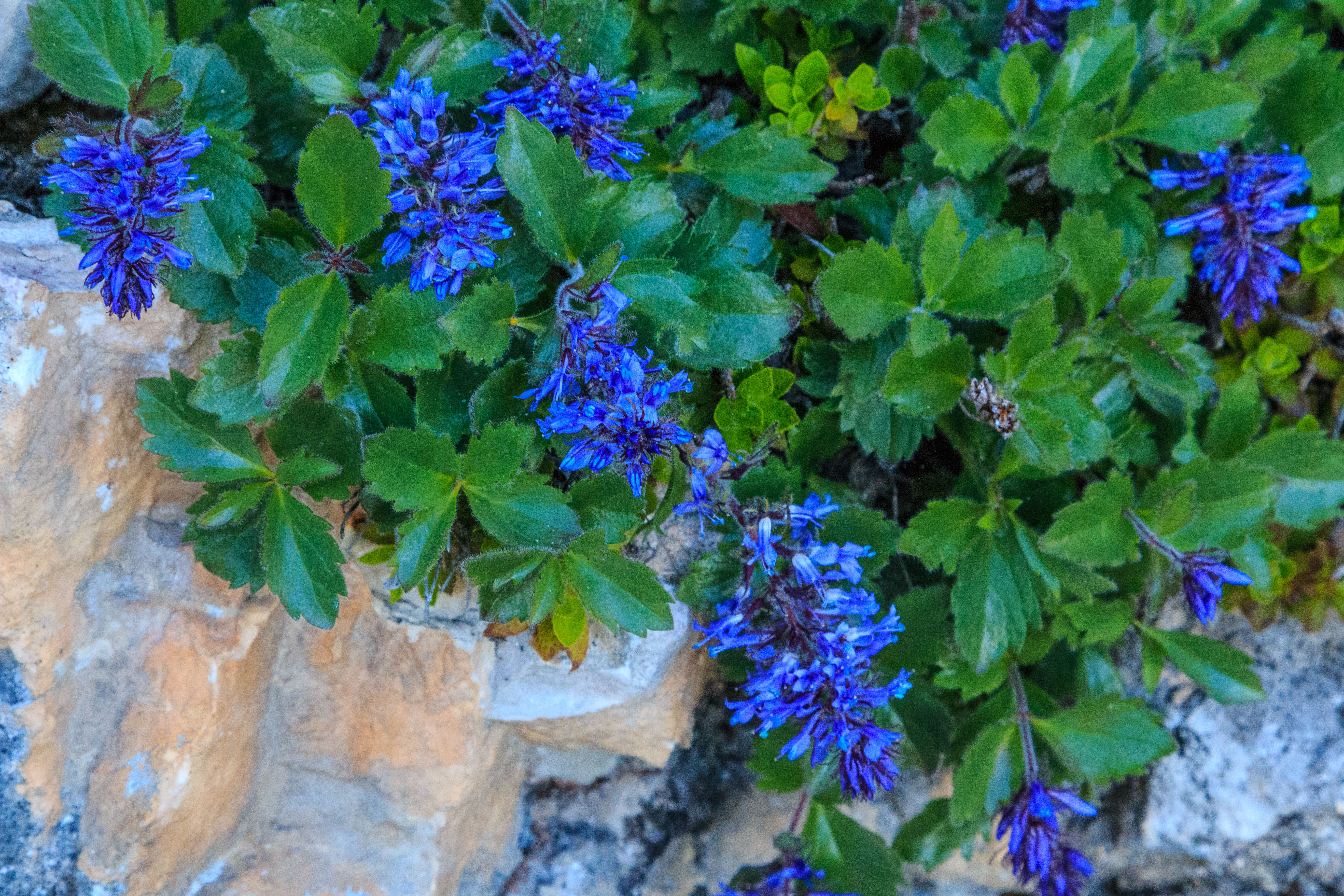 Plants from Sassolongo